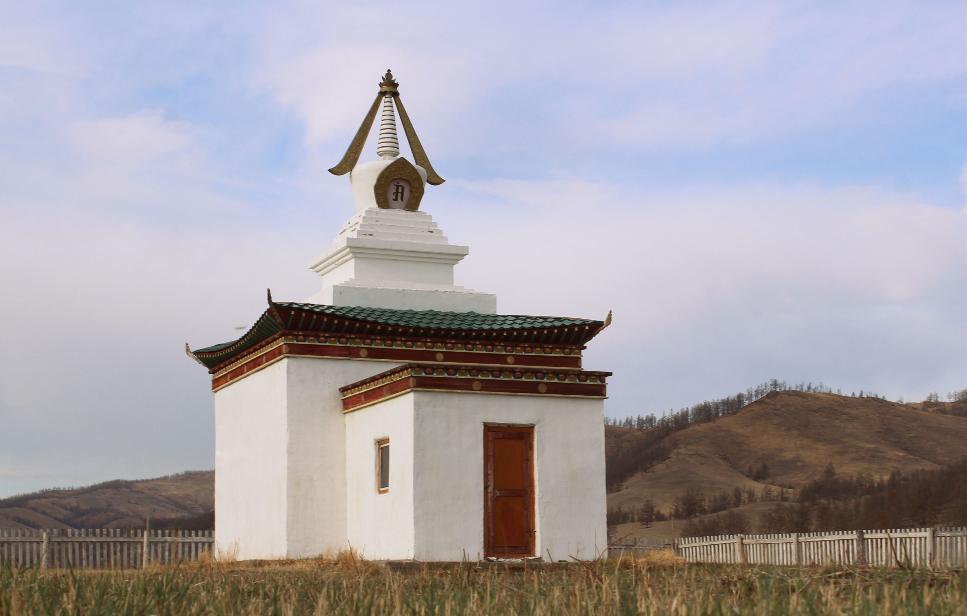 Субурган VIII Пандито Хамбо Ламе Чой Василину в окрестностях Верхнего Торея. Бурятия, Джидинский район